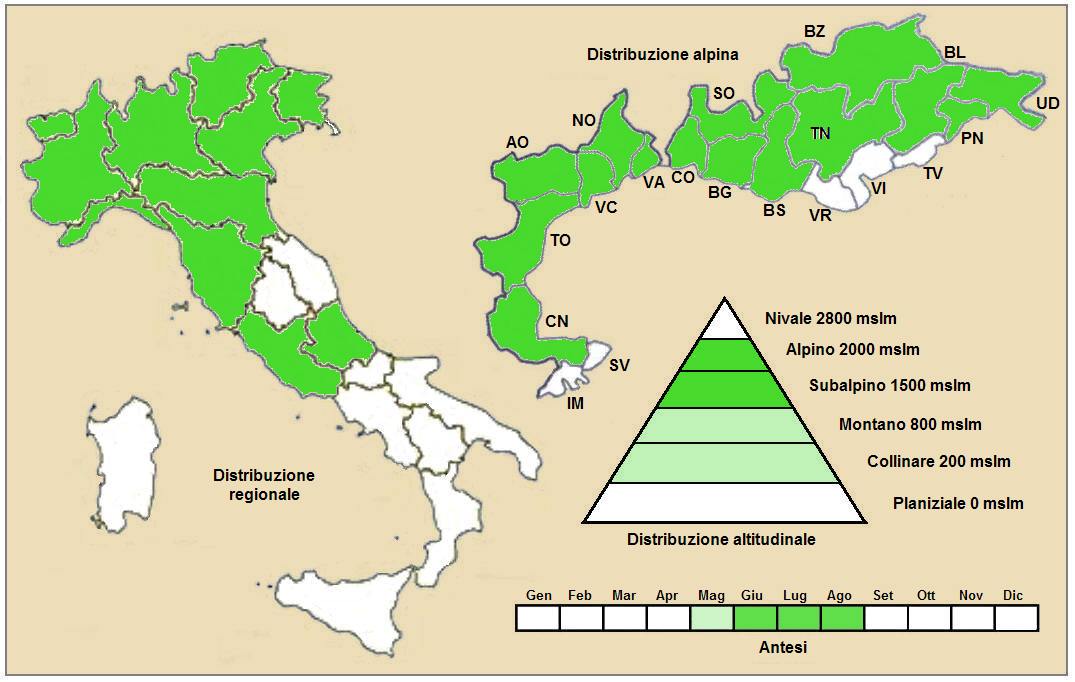 Allium schoenoprasum - Distribuzione